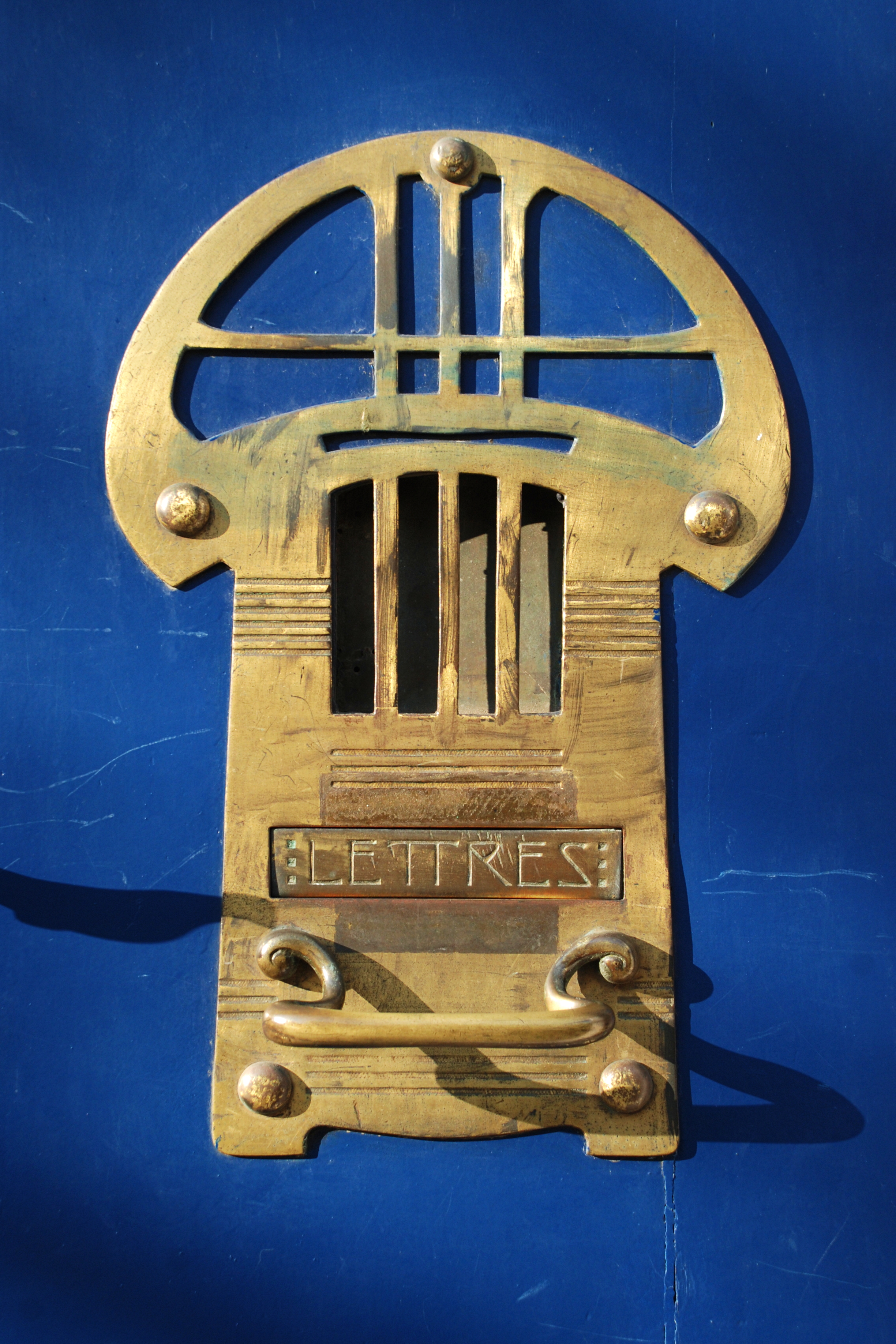 Belgique - Bruxelles - Maison-atelier du peintre Paul Verdussen (Art nouveau géométrique, architecte Paul Hamesse, 1901)